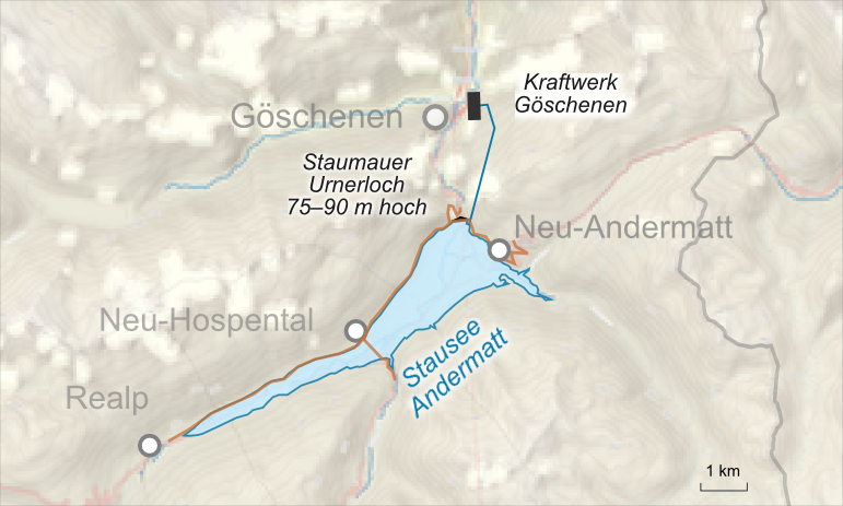 Lagekarte des Stau- und Kraftwerks Andermatt, das nicht realilsiert wurde. Das Grossprojekt hätte einen Stausee im Urserental erfordert. Die Karte zeigt auch die Kraftwerke Wassen und Andermatt, die als Teil der Reusskaskade realisiert wurden. Der Stausee ist mit der neune Strassenführungen dargestellt.